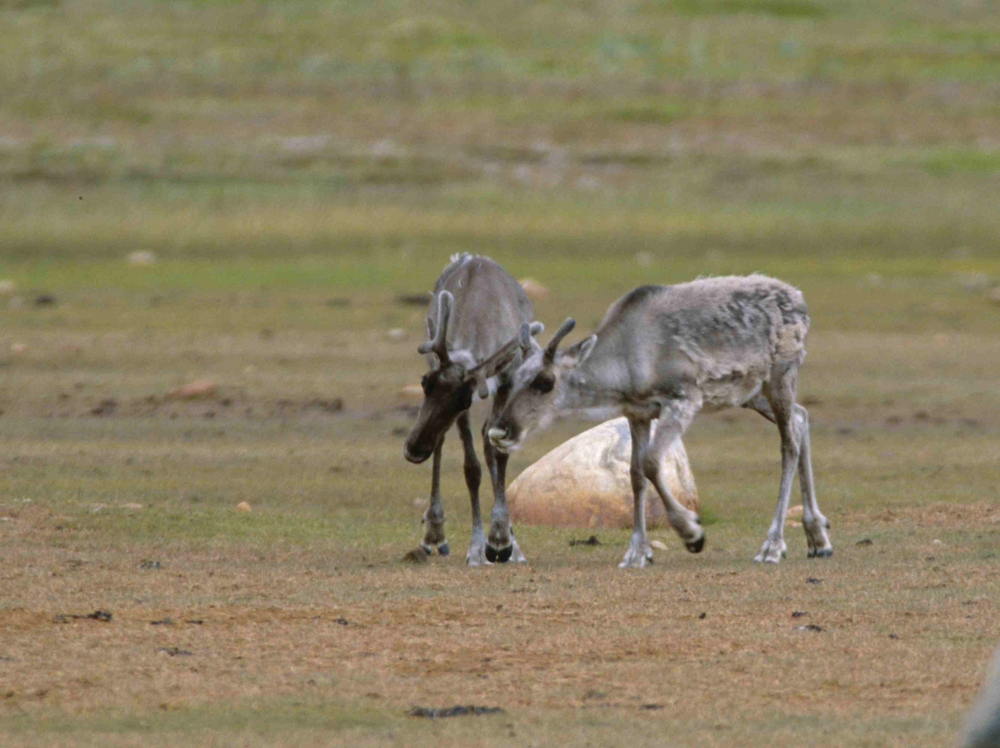 Two young Barrenground caribou, Rangifer tarandus, near Wager Bay (Ukkusiksalik National Park, Nunavut, Canada)